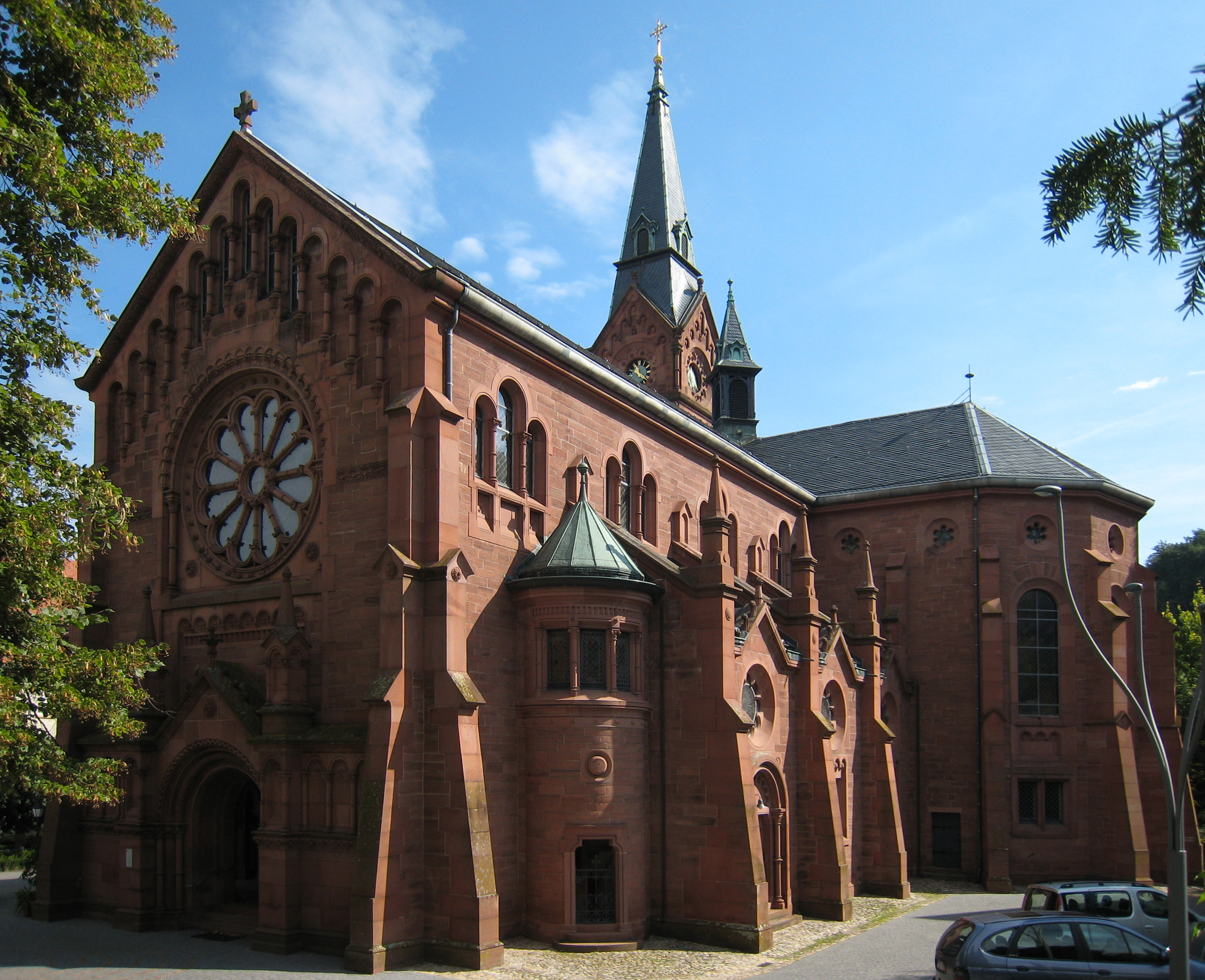 Pauluskirche in Badenweiler. Badenweiler/Süd-Schwarzwald/Deutschland